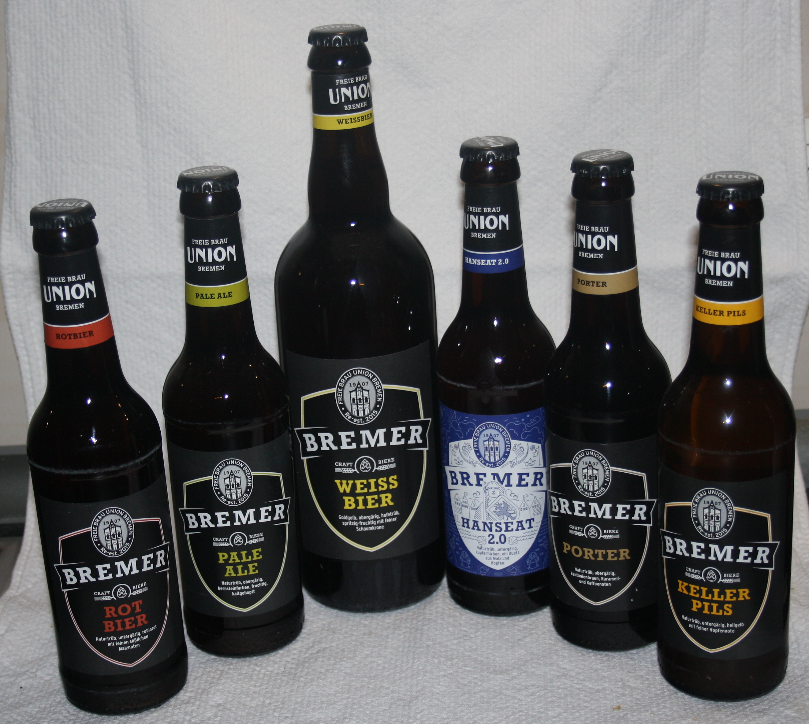 Eine Auswahl an Bieren der Union Brauerei aus Bremen